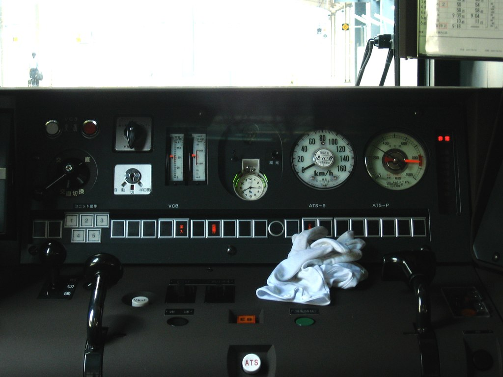 521系の運転台。223系2000番台と321系の運転台に交流機器、ワンマン関連装置を搭載したもの。 special rapid(ja/en) 11:57, 11 June 2007 (UTC)